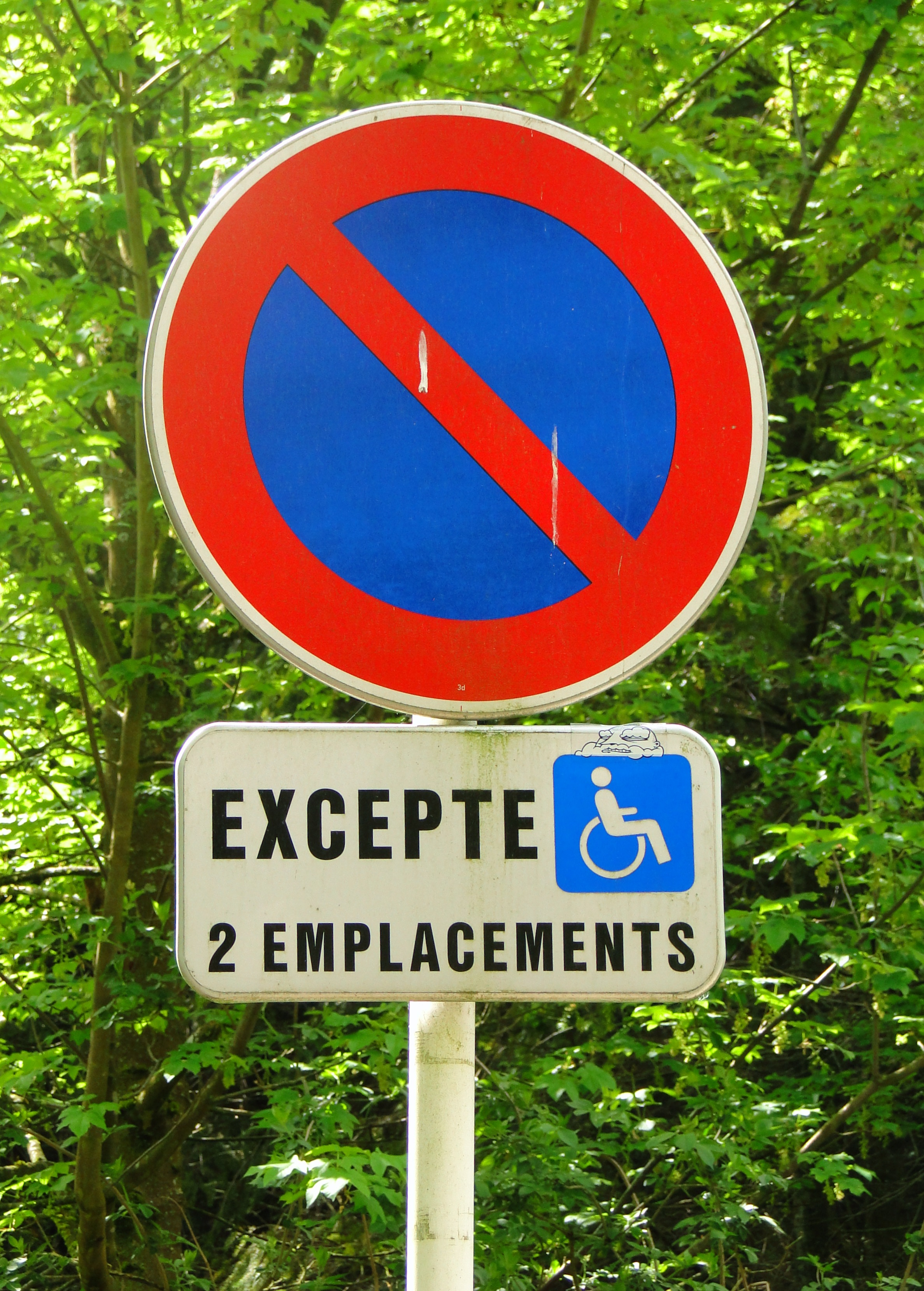 Verkéiersschëld C,18 aus dem Lëtzebuerger Code de la route mam Zousazschëld Modell 5b